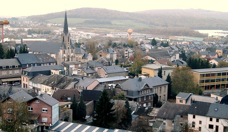 Vue du village luxembourgeois de Rodange